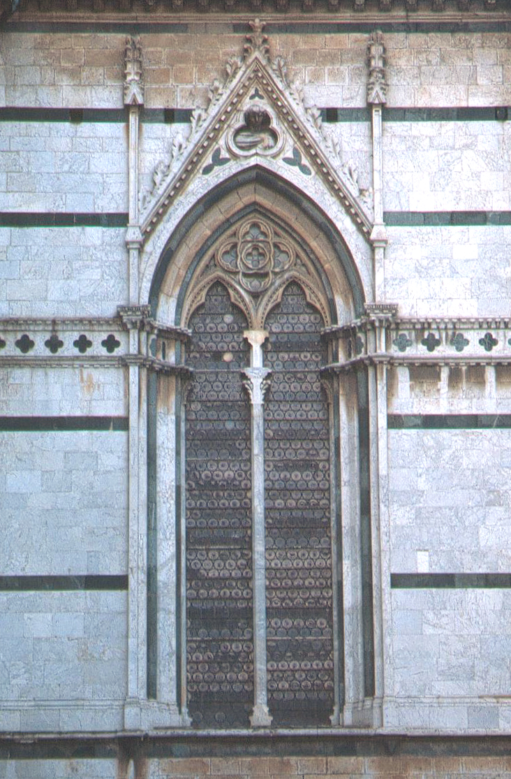 Una delle finestre sul fianco del duomo di Siena